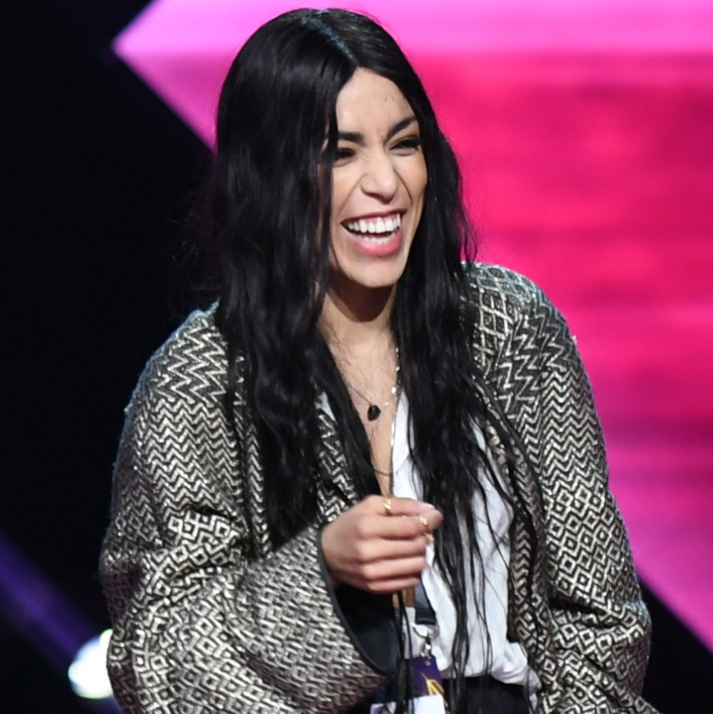 Presskonferensen på torsdagen.